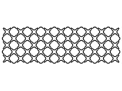 Raster, symbol för Halv Grek Plus Turk